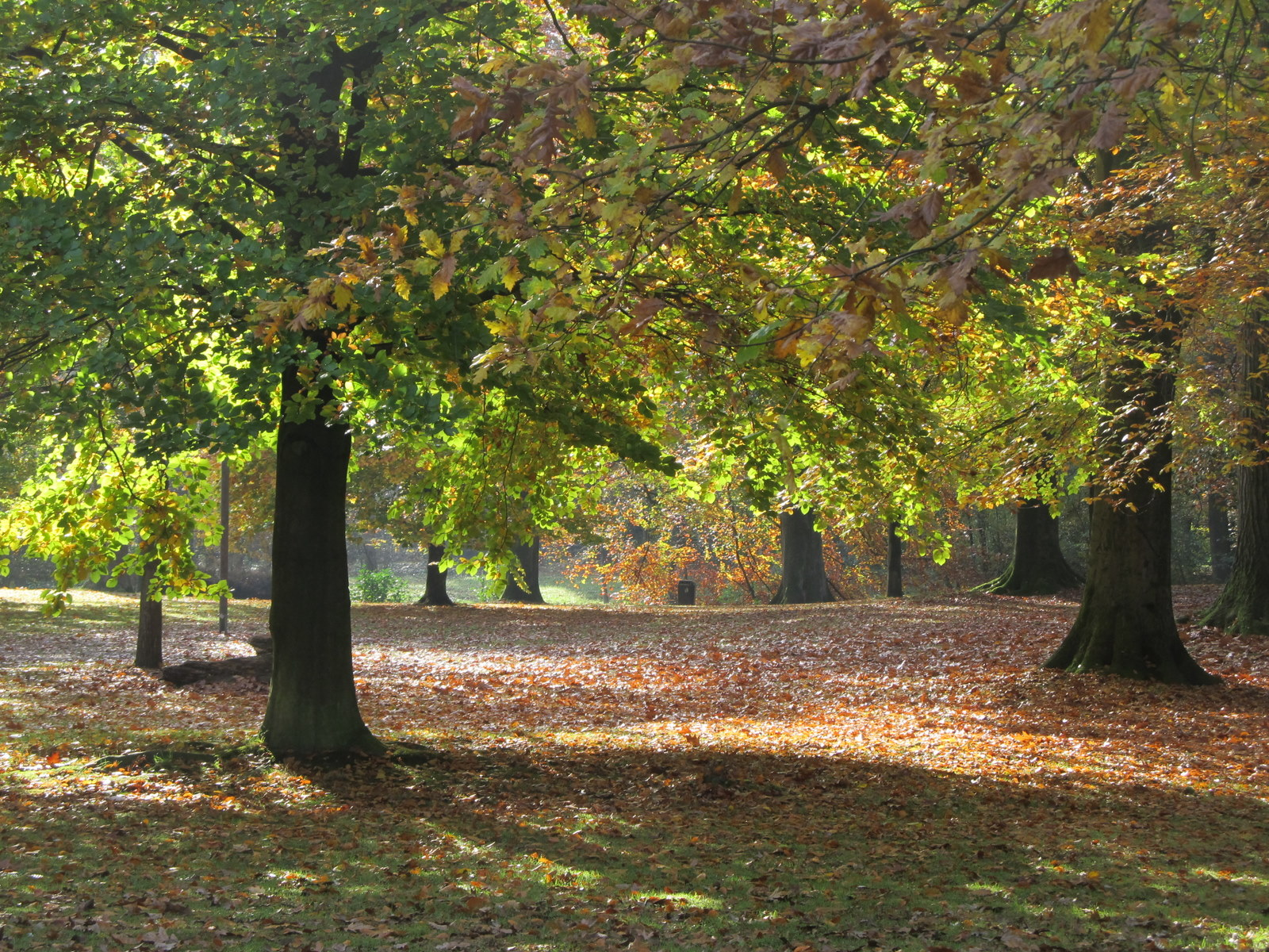 2011-10-23 in Ghent